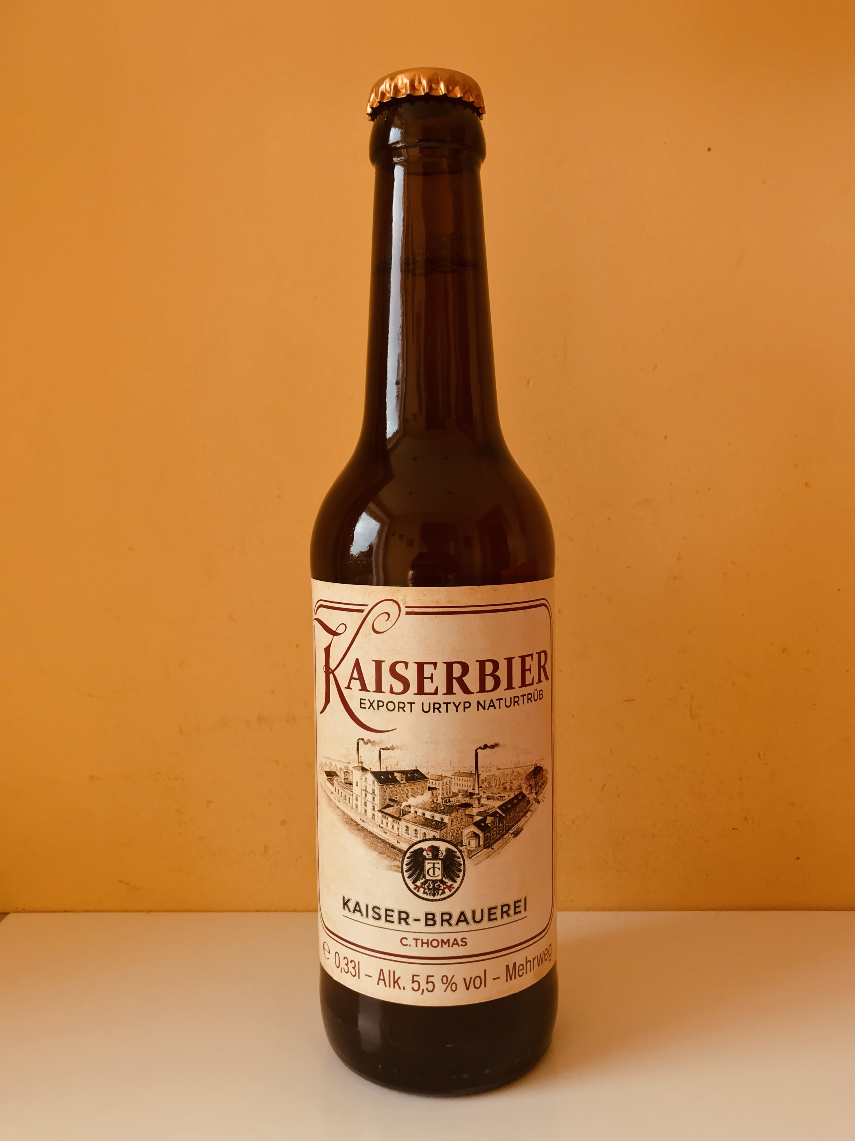 Kaiserbier Export Urtyp 0,33l Flasche